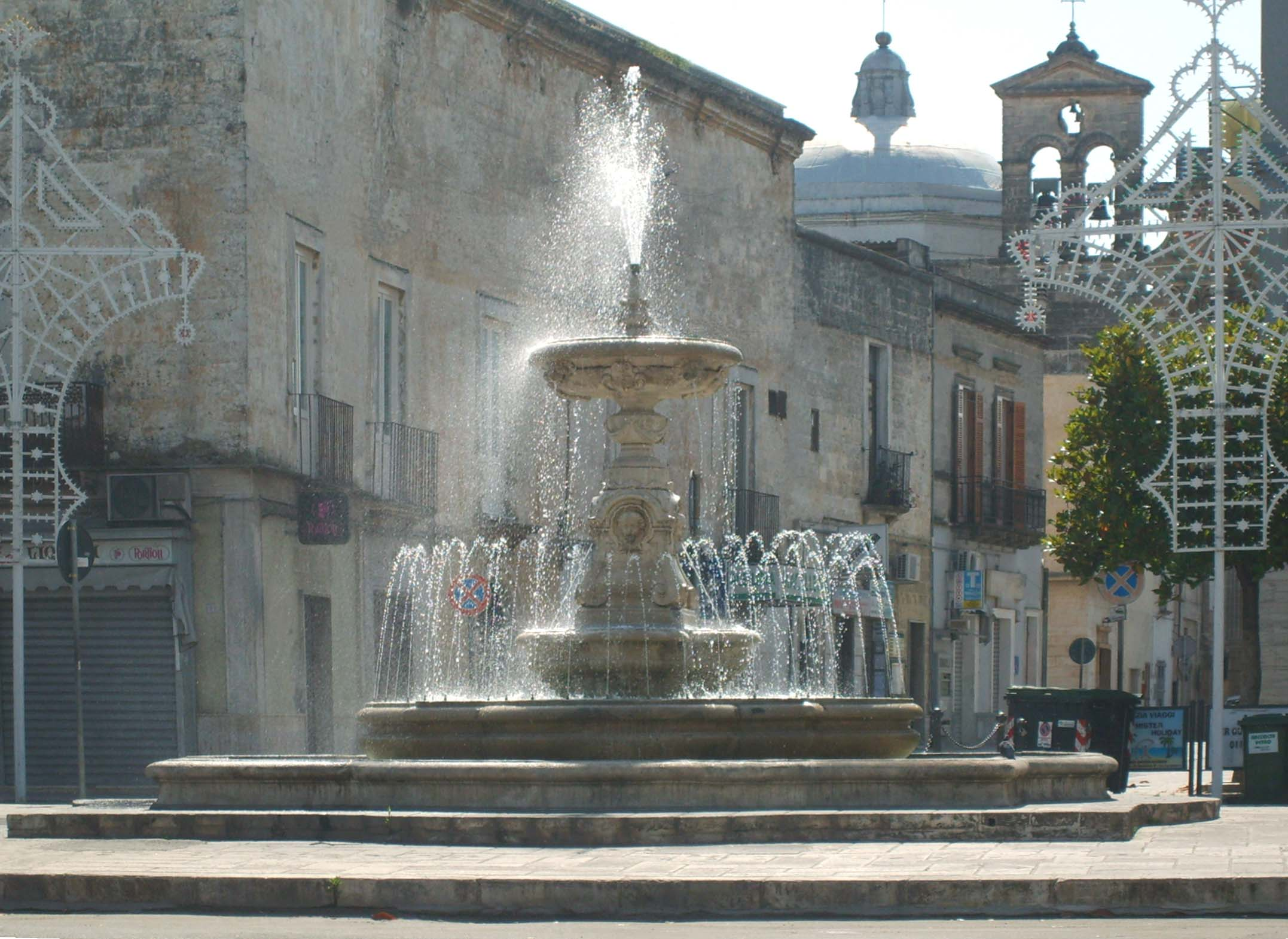 Fontana in Piazza Umberto I